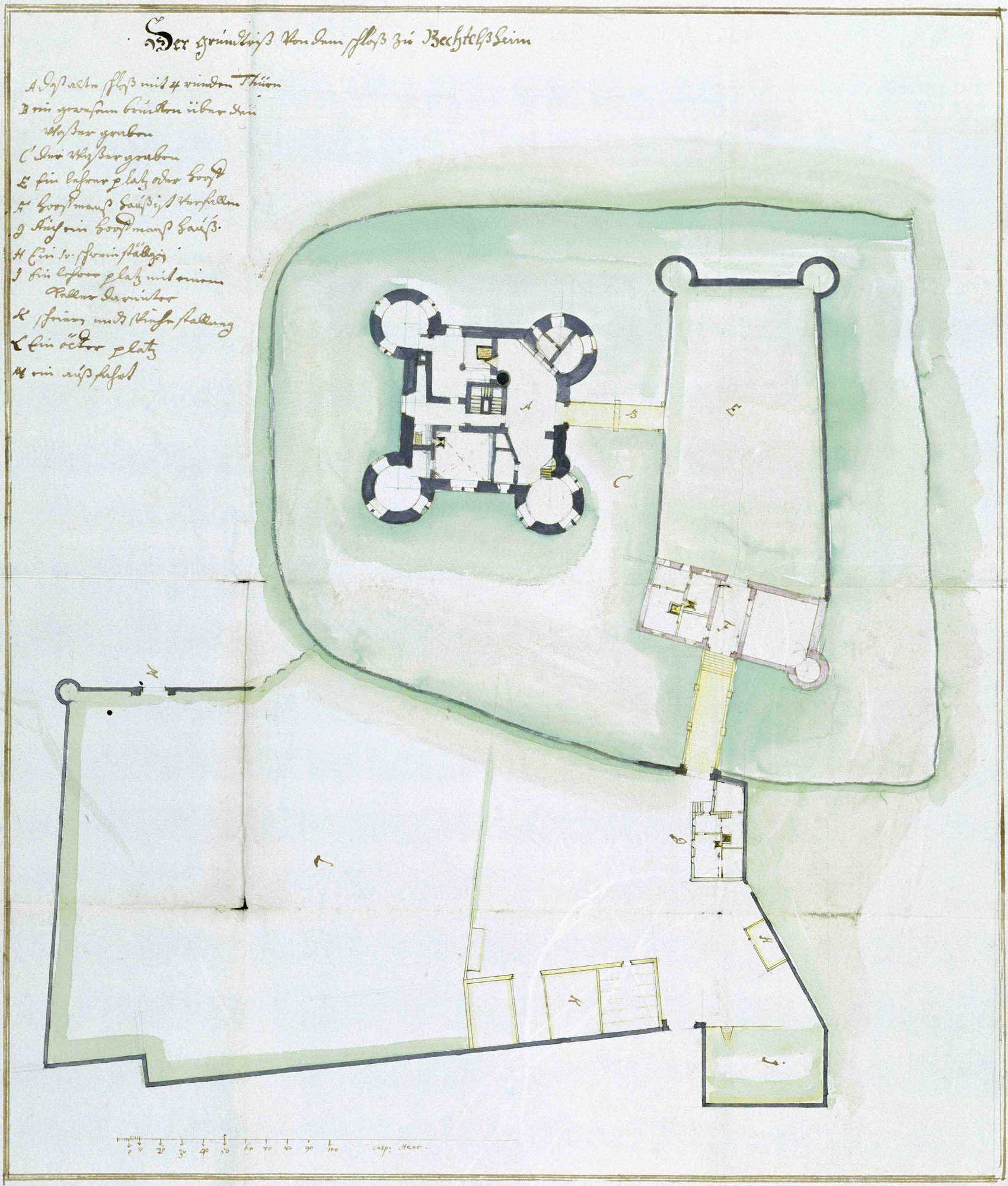 Alter Plan des Schlosses Bechtolsheim. Kolorierte Federzeichnung des Baumeisters Kaspar Herwartel vom Beginn des 18. Jahrhunderts: als Grundlage für einen projektierten Wiederaufbau „Voranschlag für Reparatur des Schlosses zu Bechtolsheim“, aus den Dalbergischen Akten, verwahrt im hessischen Staatsarchiv in Darmstadt.